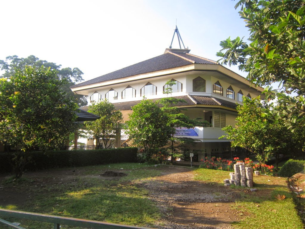 masjid LH